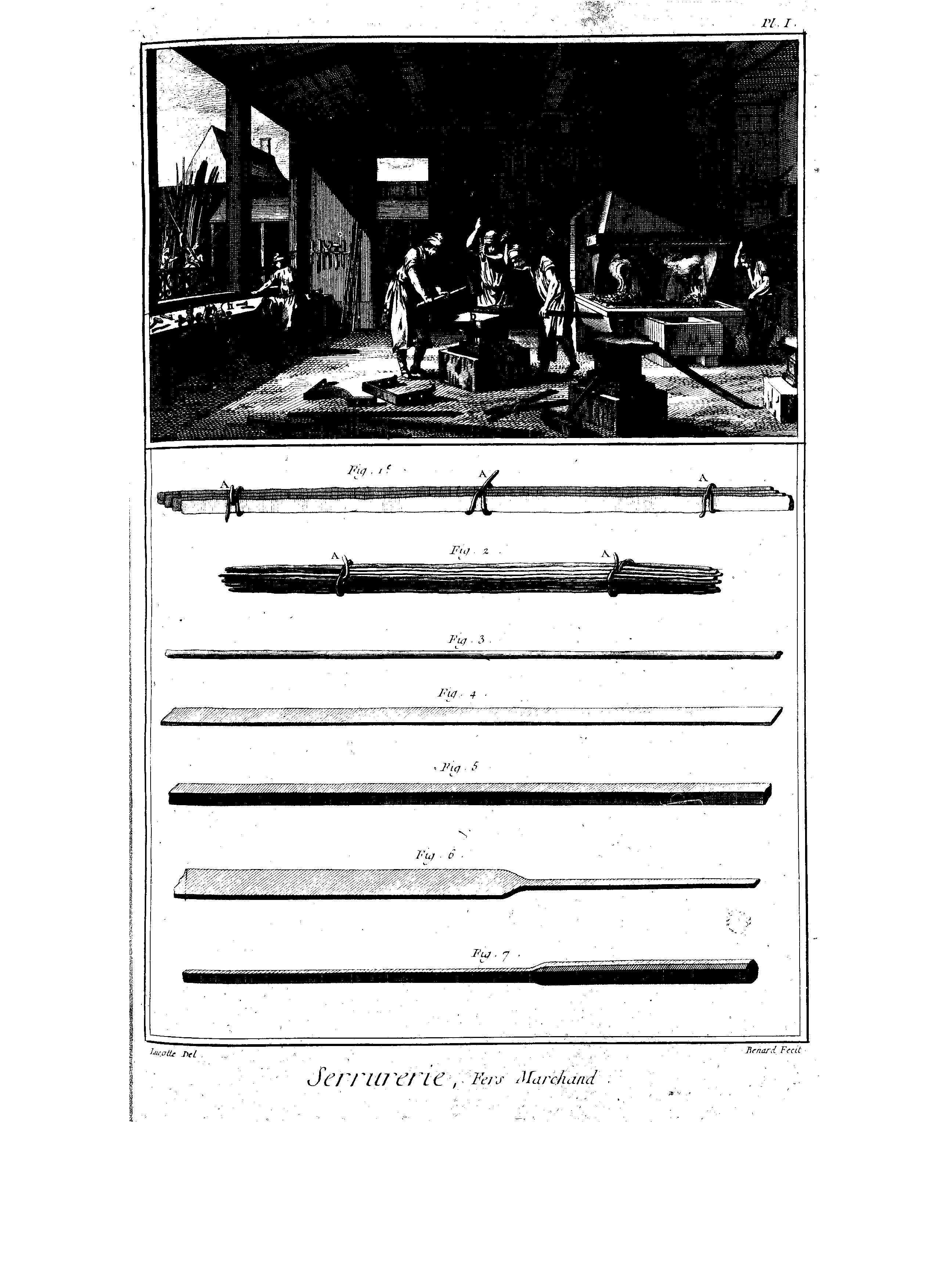 Planches de l'Encyclopédie de Diderot et d'Alembert, volume 8